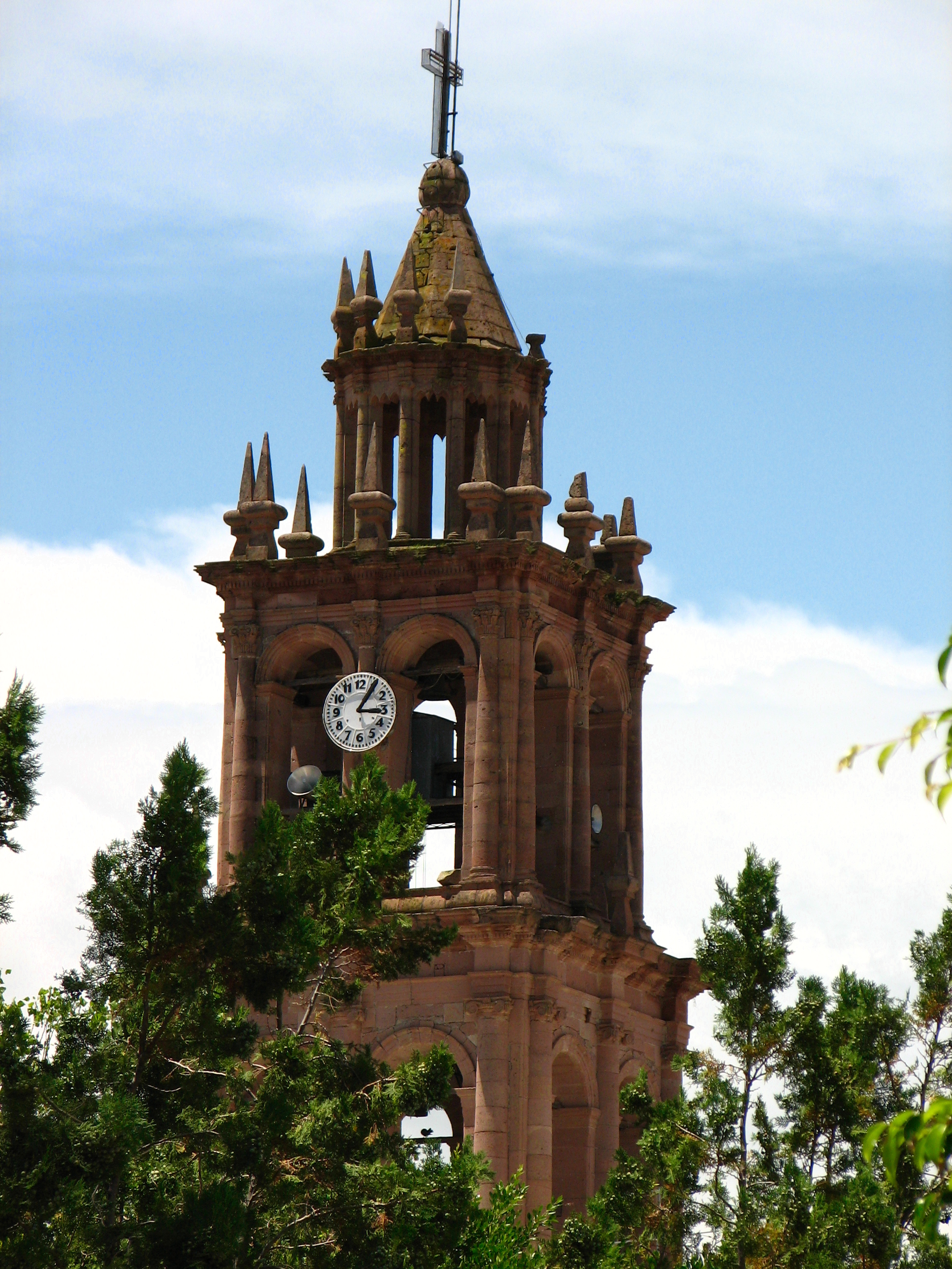 Torre de la Iglesia de Totatiche Jalisco.